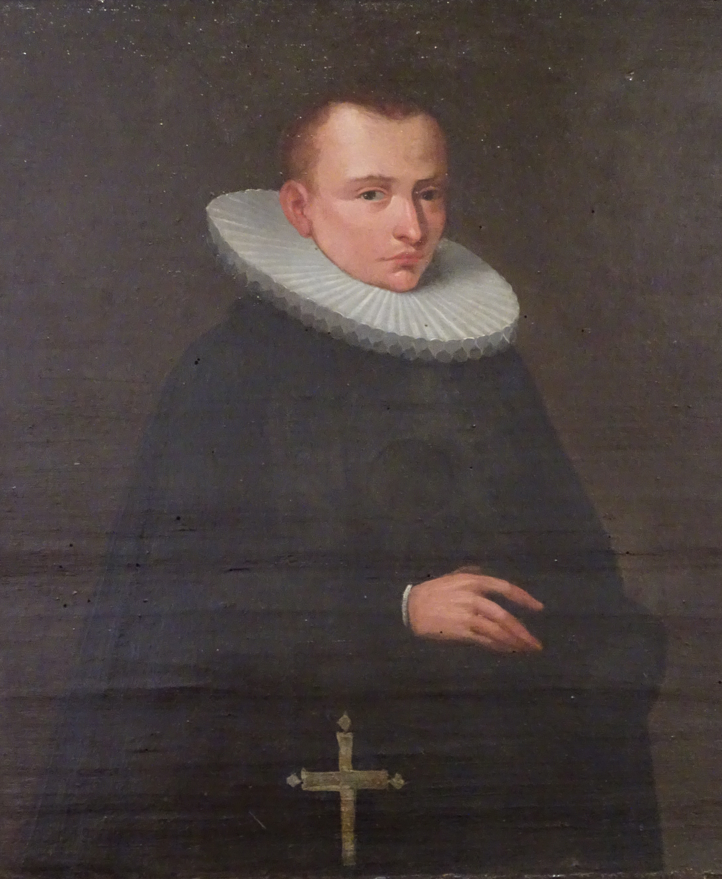 Detail aus dem Epitaph für Daniel Eulenbeck aus der Universitätskirche St. Pauli zu Leipzig.